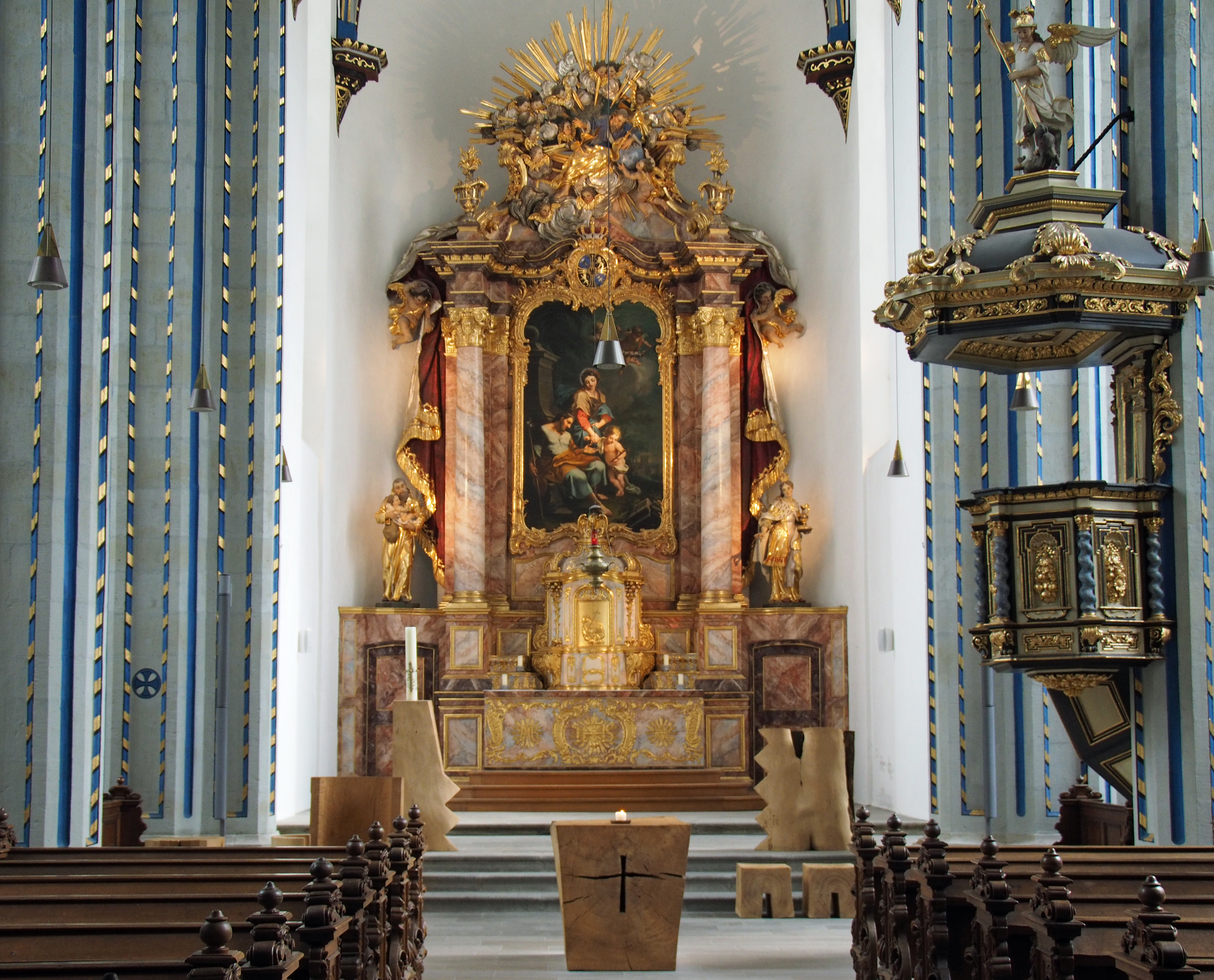 Hochaltar und Kanzel in der Namen-Jesu-Kirche (Bonn)